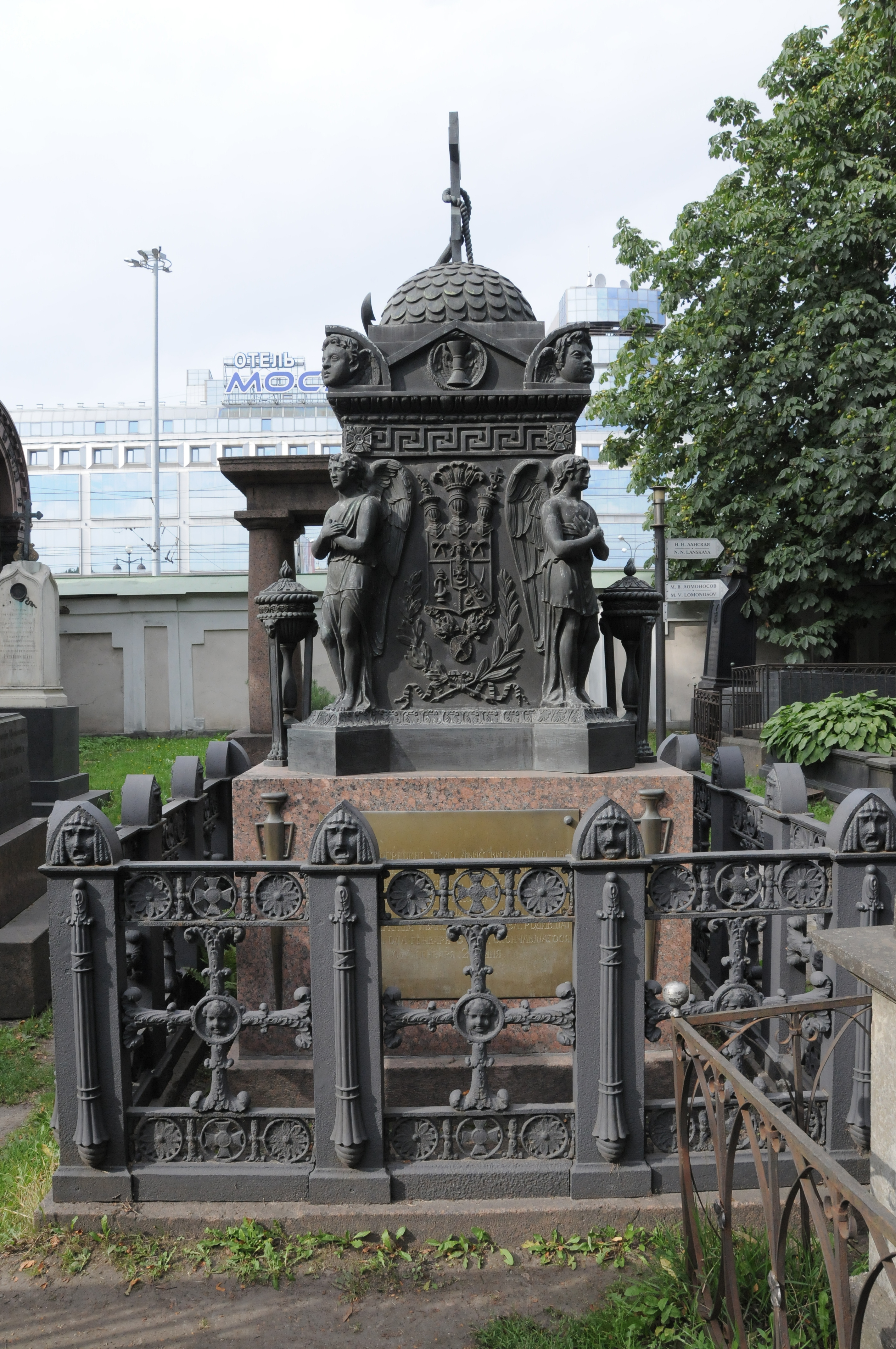 Надгробие на могиле Моркова Аркадия Ивановича на Лазаревском кладбище Александро-Невской лавры